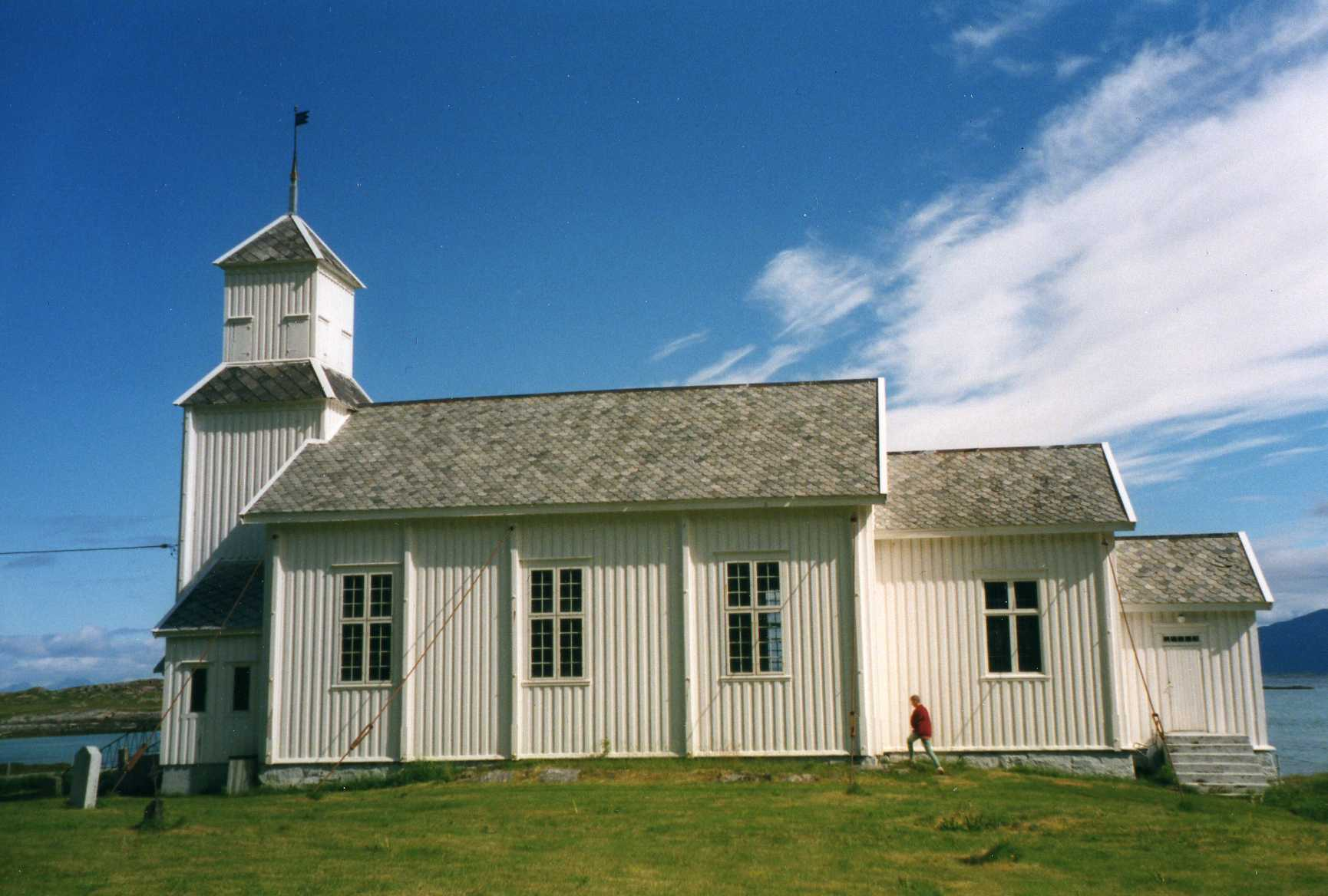 Gimsøy kirke fra 1876